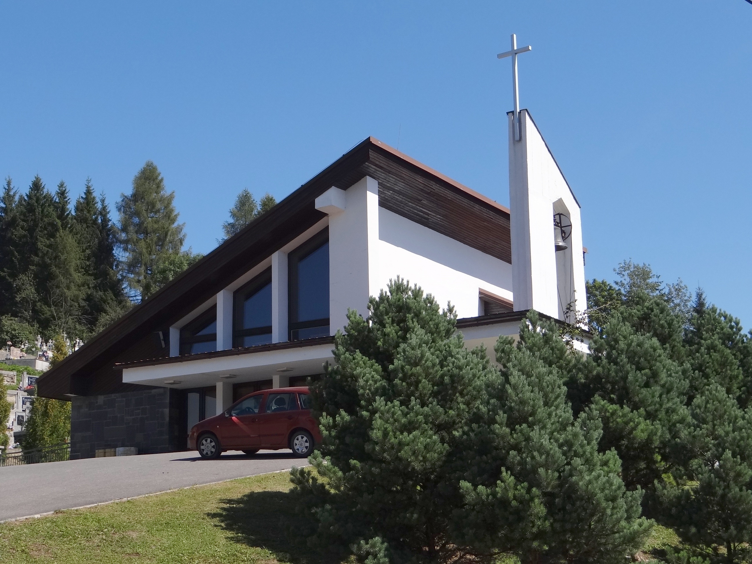 Novoť. Nowy kostol